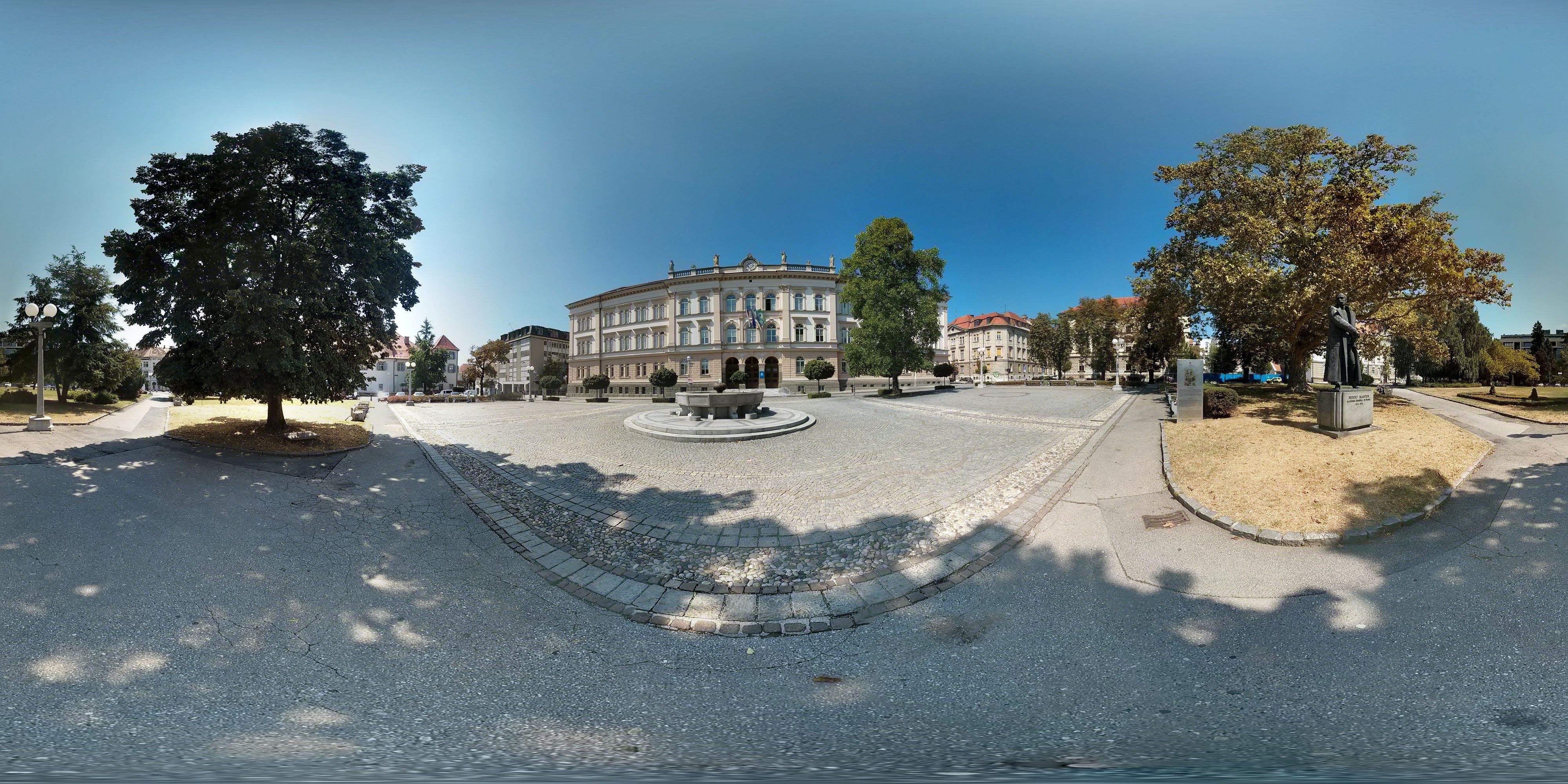 Trg generala Maistra